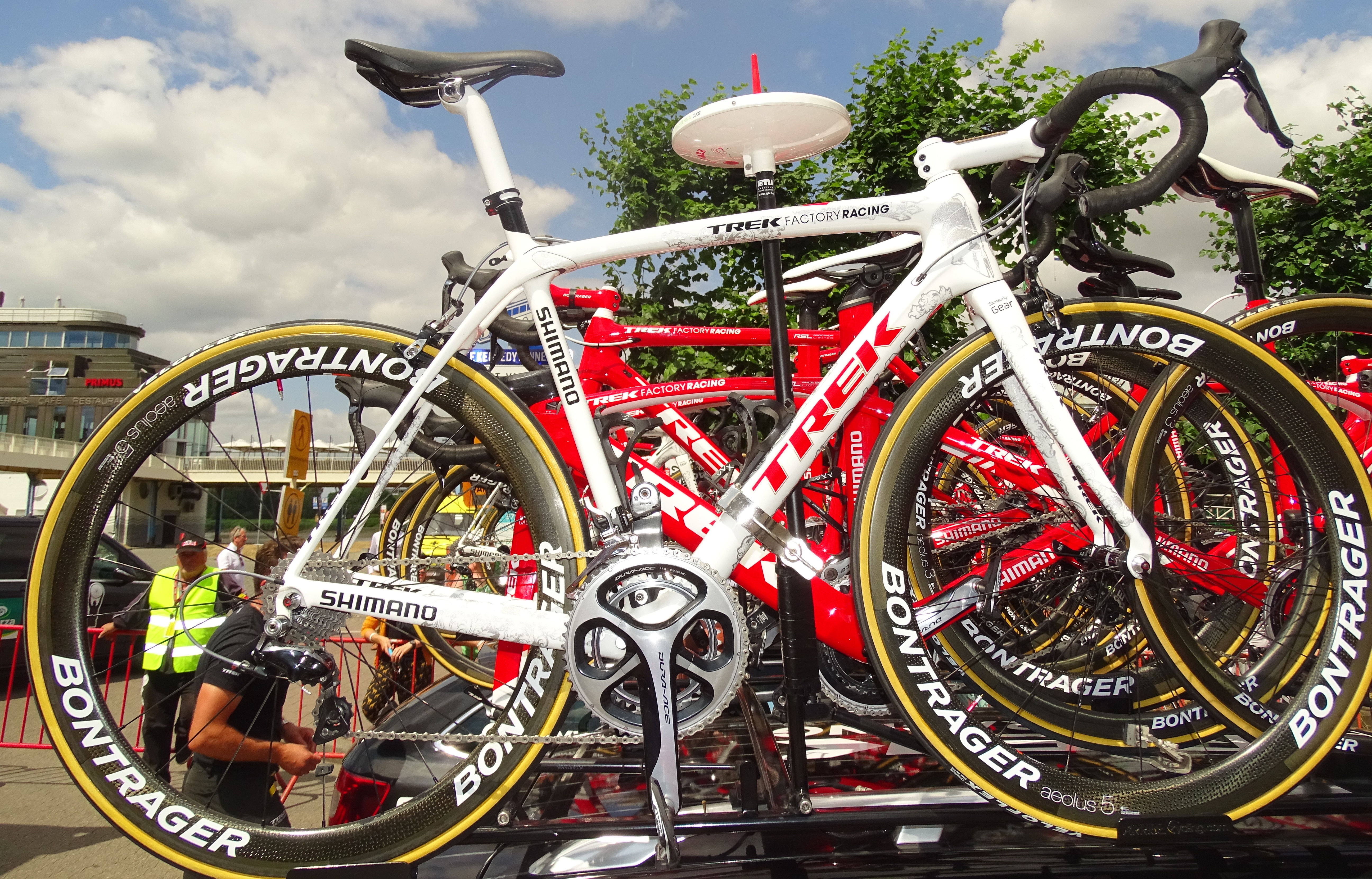 Reportage réalisé le lundi 6 juillet à l'occasion du départ de la troisième étape du Tour de France 2015 à Anvers, Belgique.